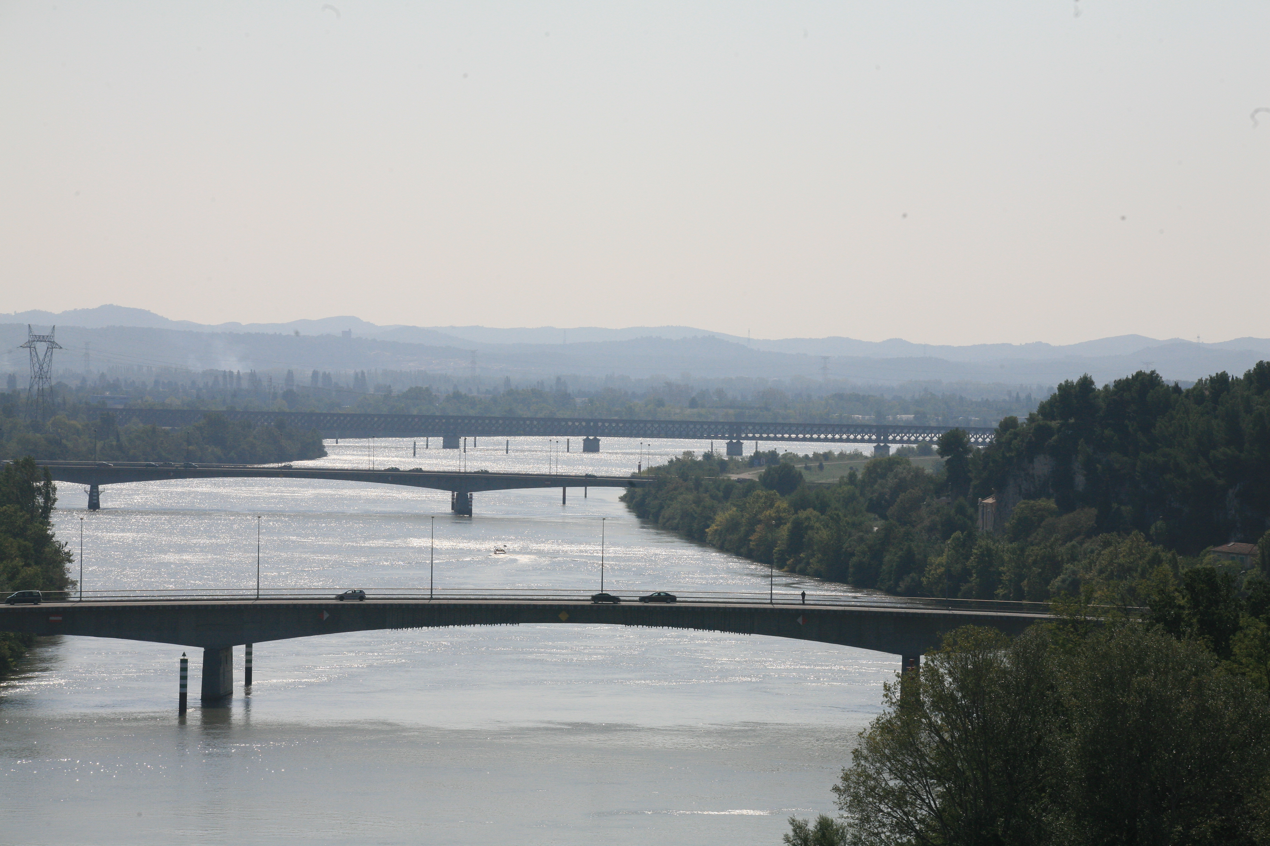 Vue de ponts à Avignon, sur le Rhône, Vaucluse, France.